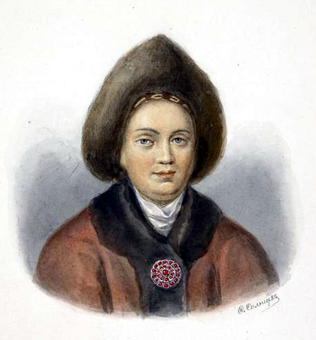 Марфа Алексеевна (1652—1707) - царевна, в иночестве Маргарита, вторая дочь царя Алексея Михайловича и его первой жены Марии Ильиничны Милославской, сестра царей Фёдора III и Ивана V Алексеевичей и сводная сестра царя Петра I.